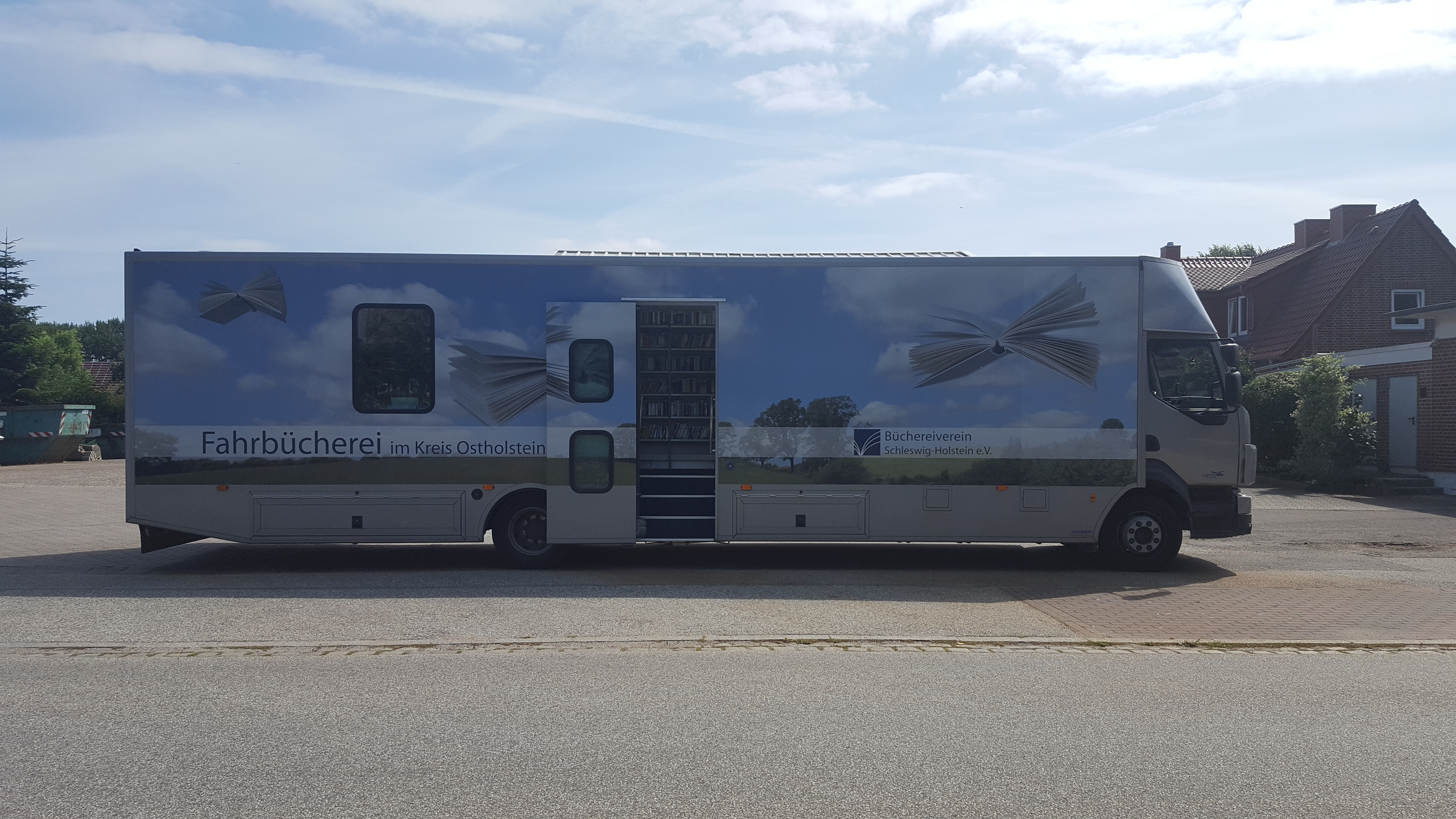 Fahrbücherei